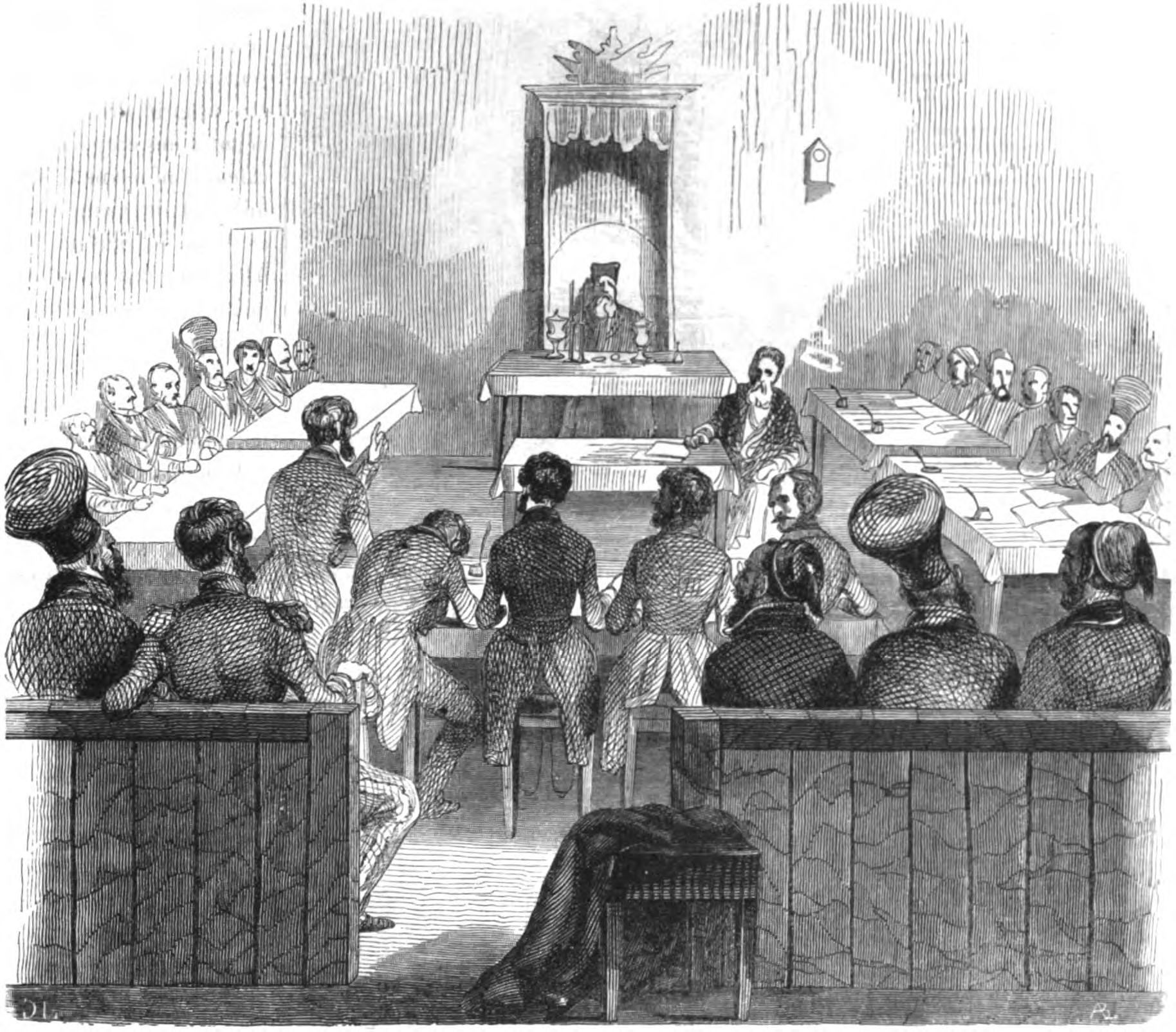 Chambre des États de Valachie